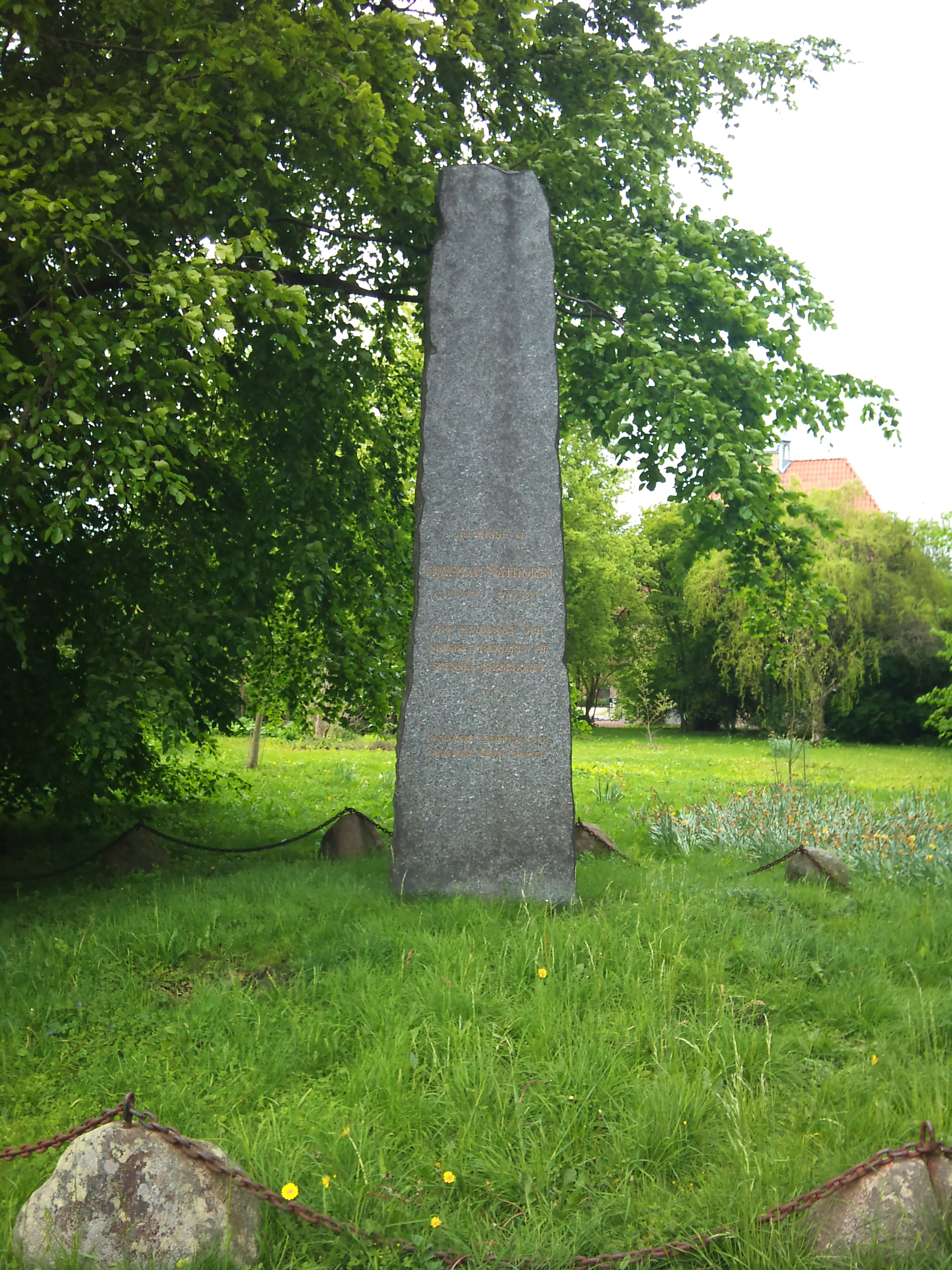 Monument över Hjalmar Nathorst. "Till minne af Hjalmar Nathorst 10.9.1821 † 7.3.1899 Den framsynte och nitiske främjaren af svenska jordbruket Tacksamma landtmän och lärjungar reste stenen"